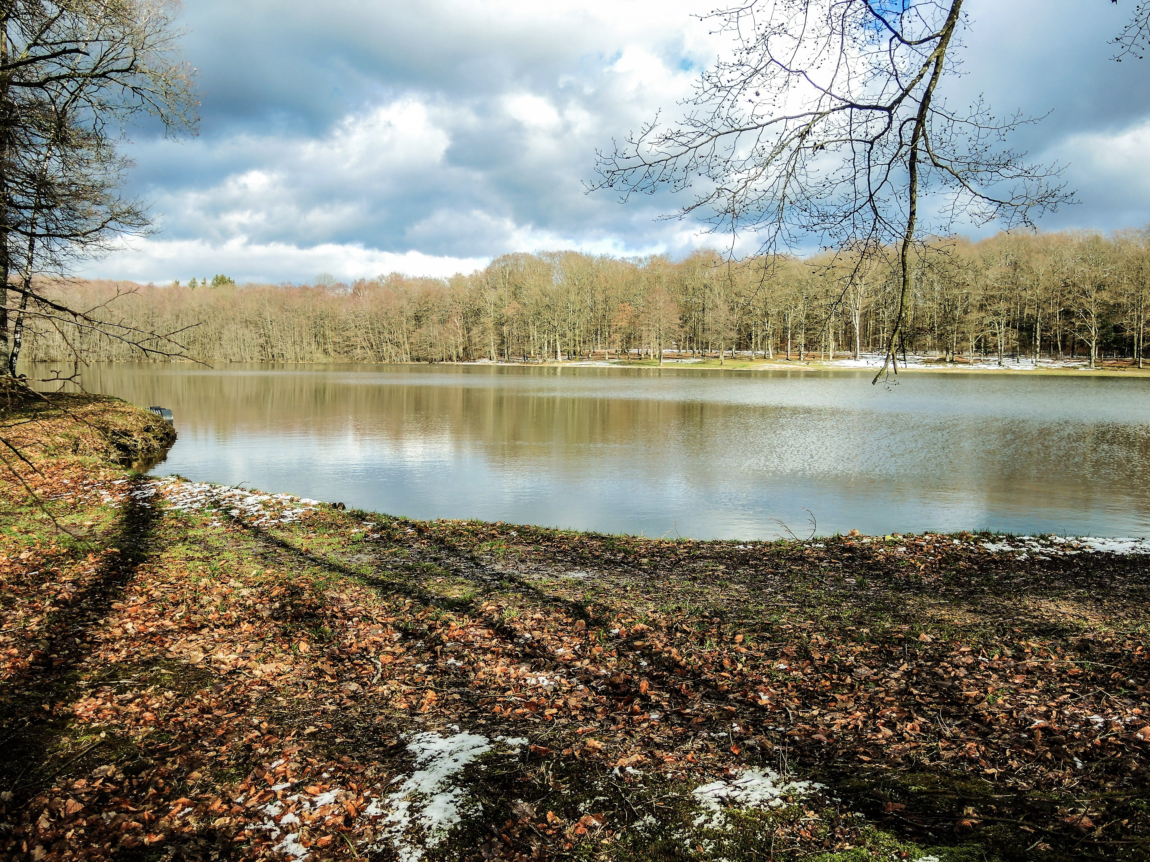 Lac de la Seigneurie. Leval. Territoire de Belfort.